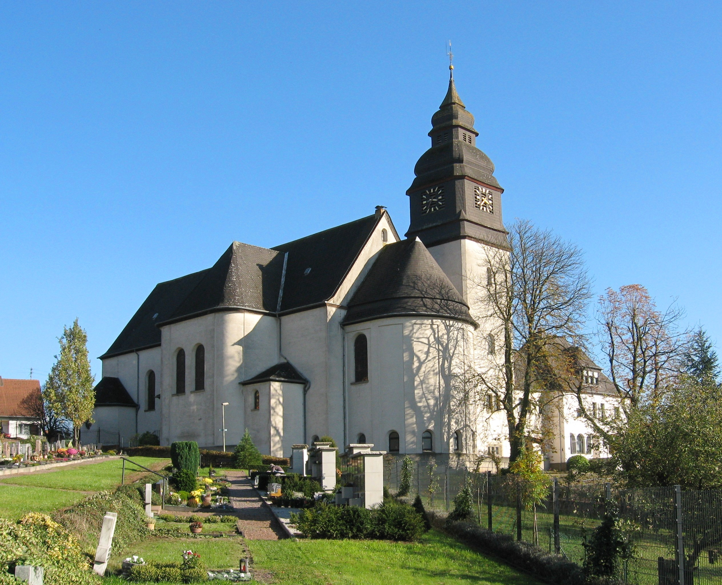 kath. Kirche in Piesbach